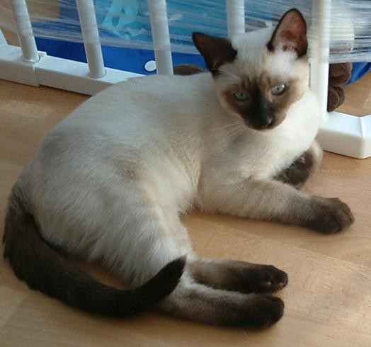 Chaton thaï seal point